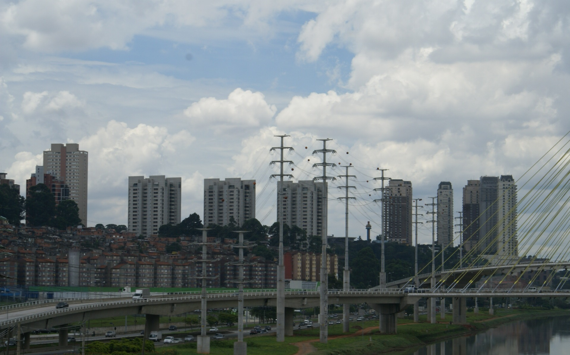 Real Parque e Jardim Panorama, São Paulo, Brasil. - Real Parque and Jardim Panorama neighborhood, São Paulo City, Brasil.